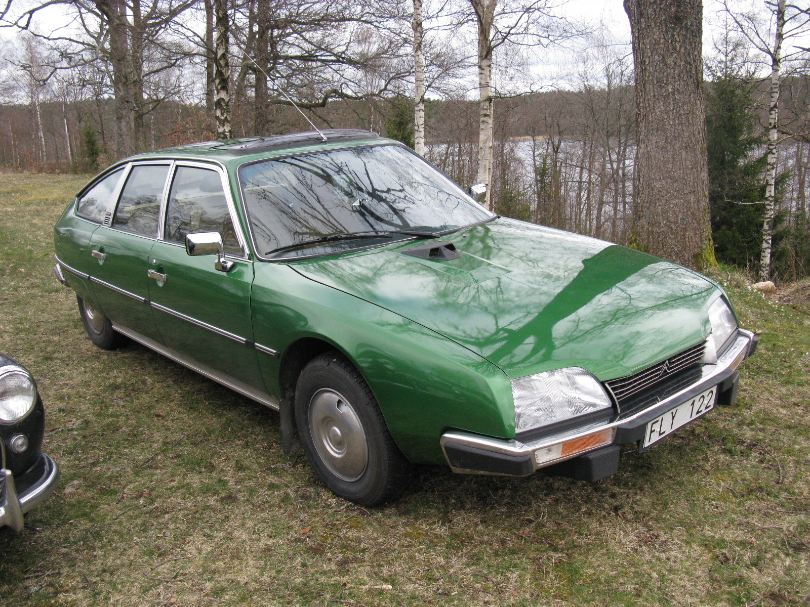 1979 Citroen CX 2500 Diesel Pallas